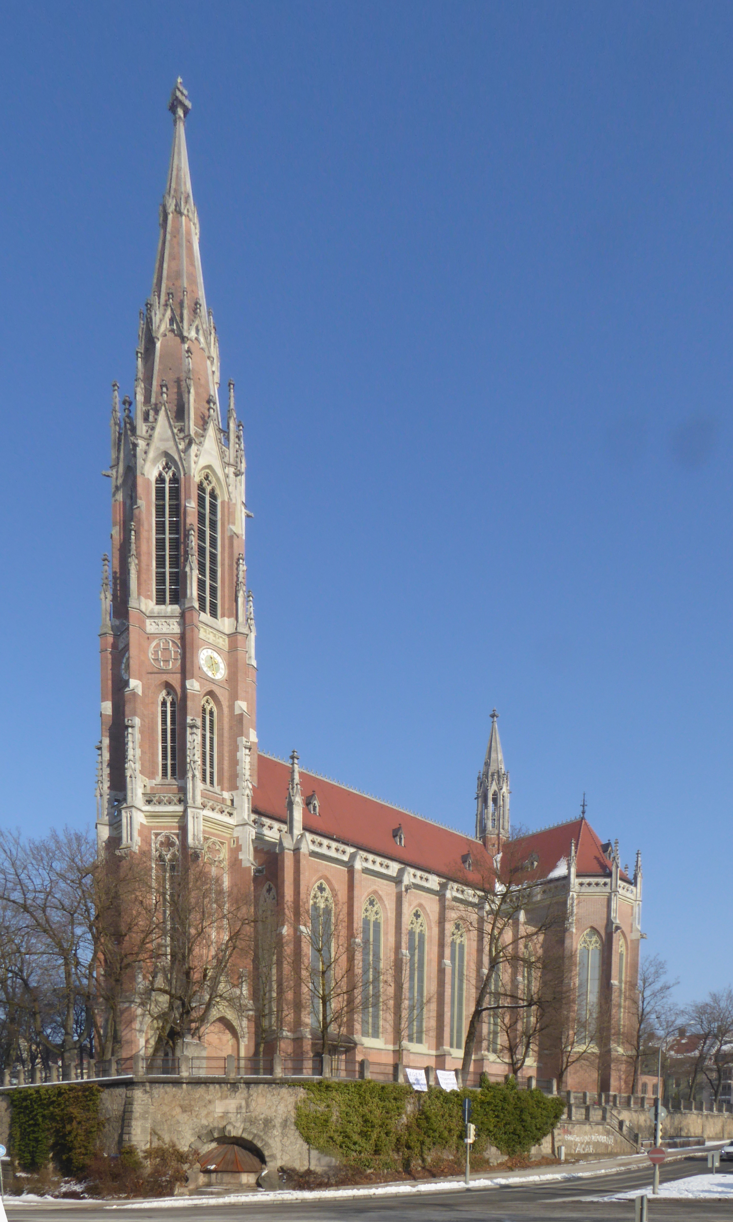 Kreuzkirche in München-Giesing, von Südwesten gesehen.